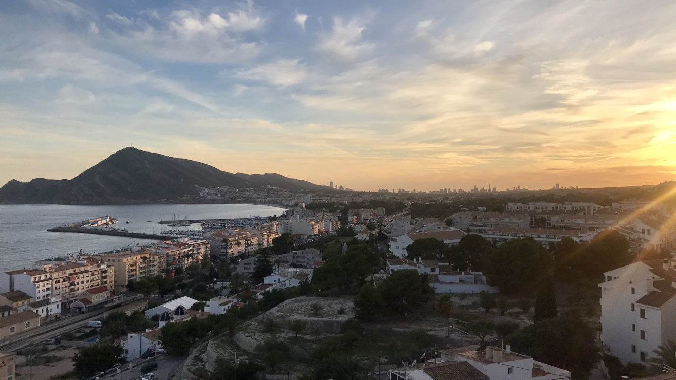 vista de la ciudad y de su costa.